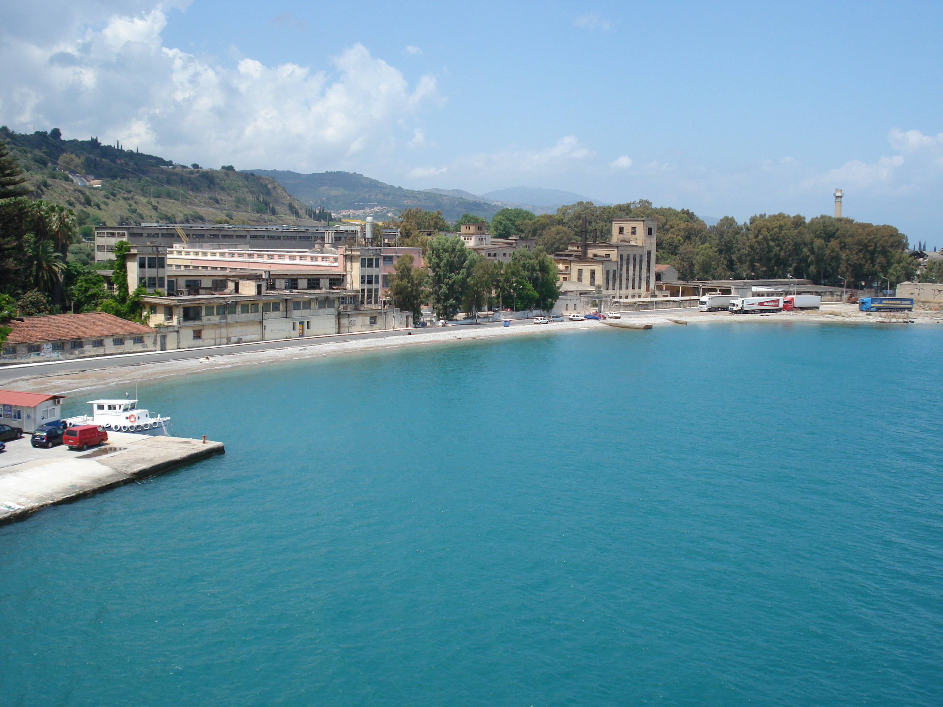 Wow